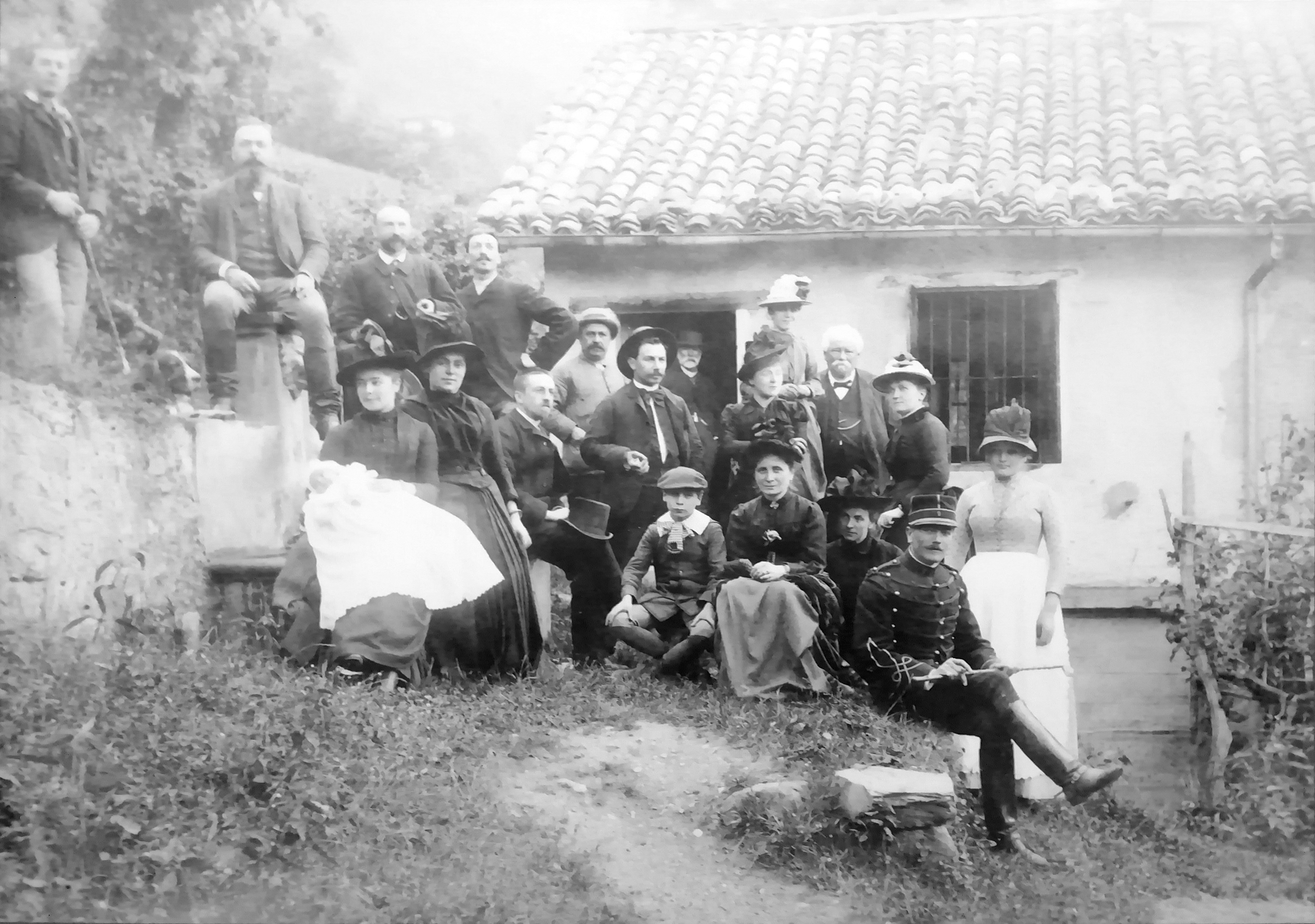 Albert Ravanat (Domène, 1858 - Grenoble, 1942), Une dimanche à Proveysieux, vers 1888-1889, photographie, Musée Dauphinois, Grenoble. Informations tirées de la plaquette de l'Exposition temporaire "Grenoble et ses artistes au XIXe siècle" au Musée de Grenoble. Groupe devant la maison de Th. Ravanat.